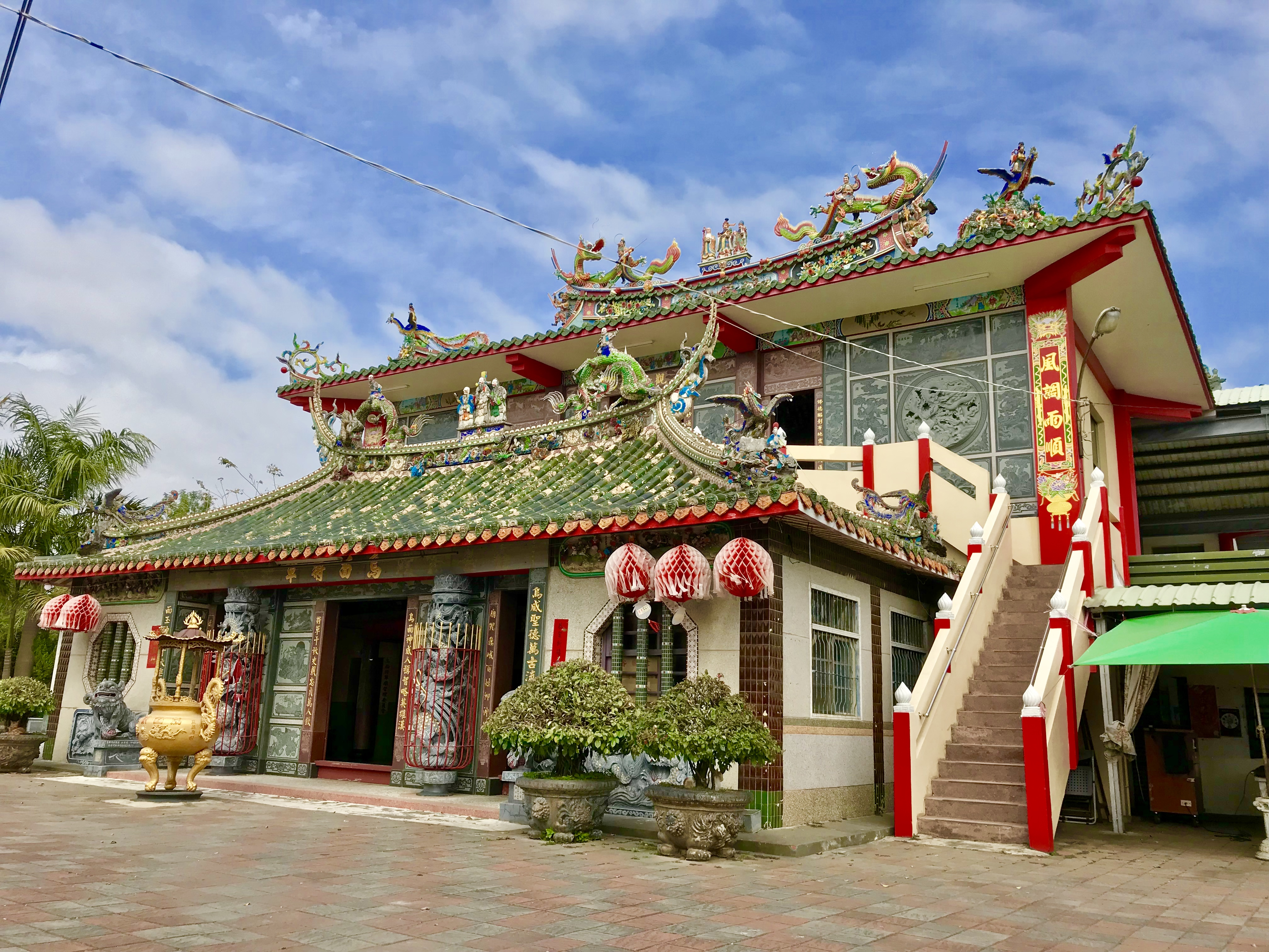 中文（台灣）: 烏面將軍廟斜照